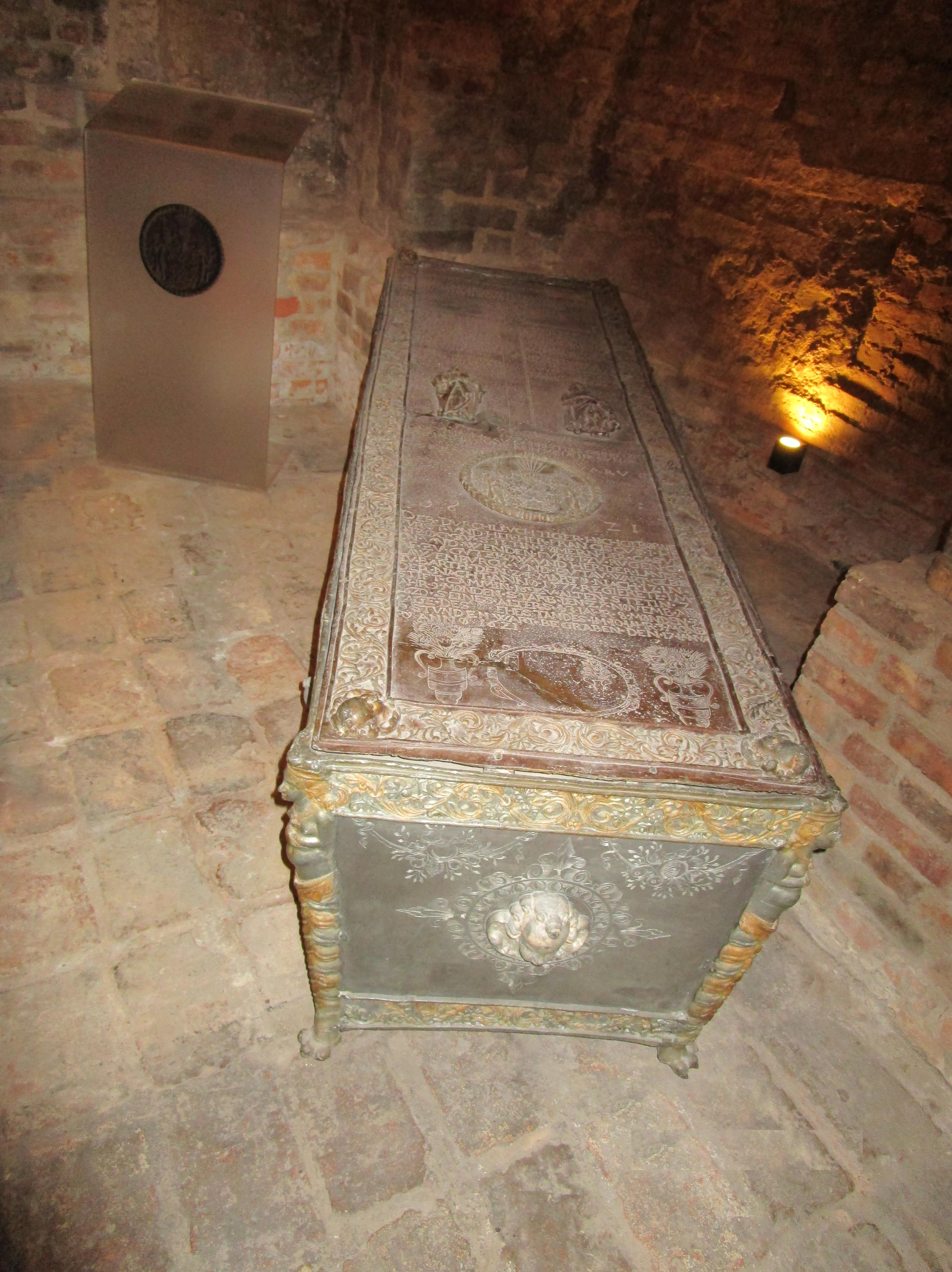 Herzogsgruft im Schloss Stettin